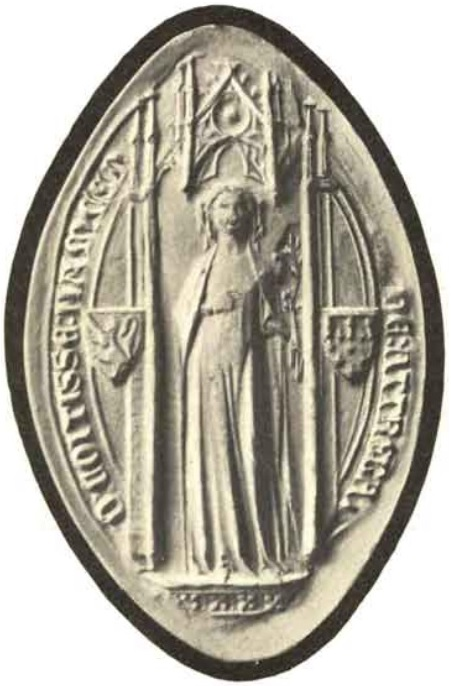 Zegel van Maria van Artesië, weduwe van Jan I van Namen.